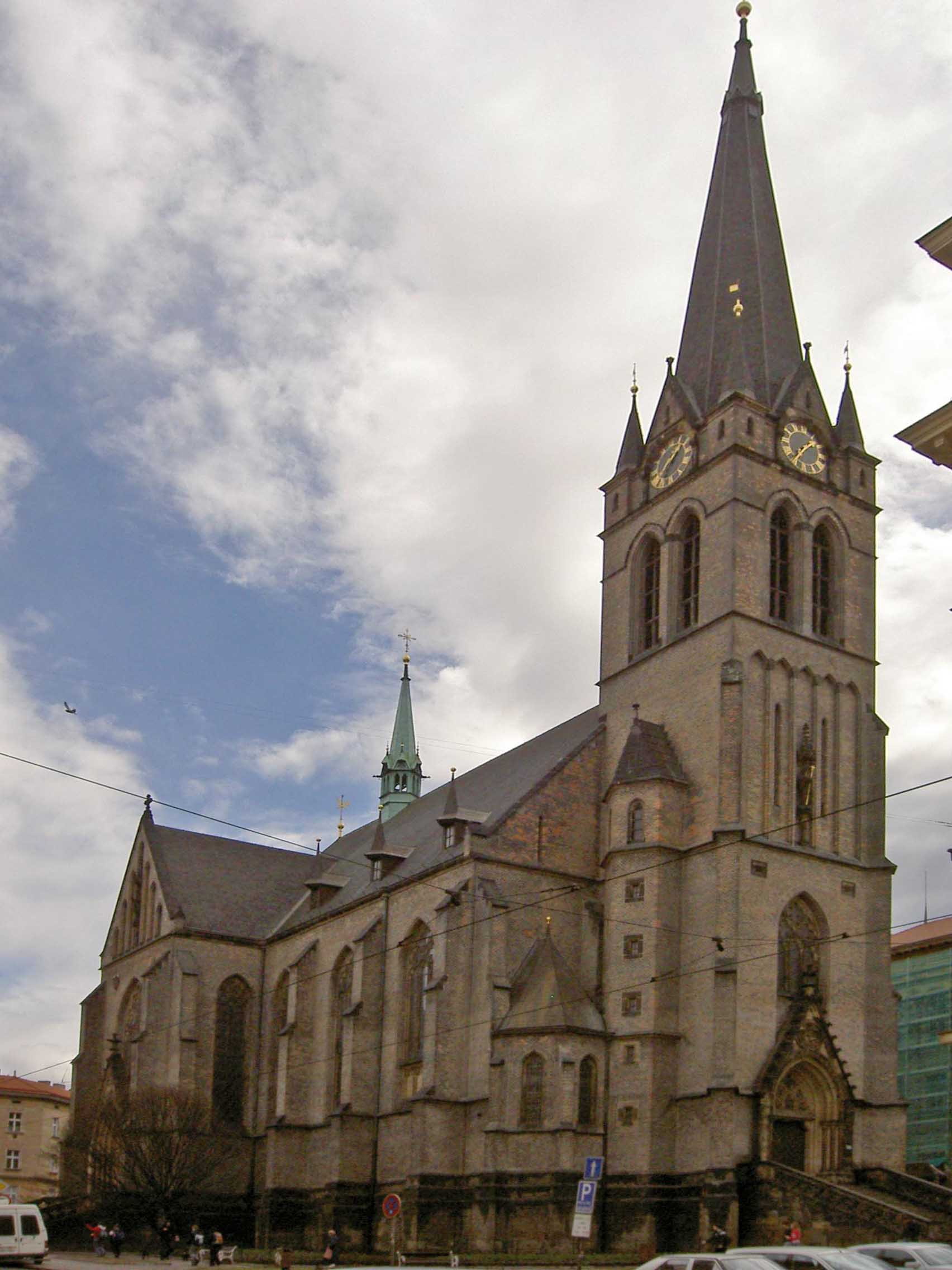 Kostel svatého Prokopa, Žižkov